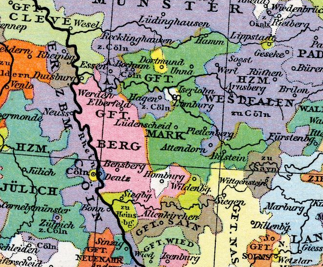 Deutschland im 14. Jahrhundert, Ausschnitt Herzogtum Berg